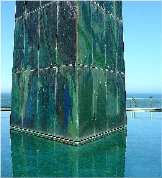 Detalle do obelisco Mileniun, A Coruña